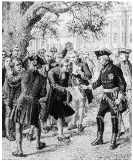 Friedrich II. nimmt an der Bittschriftenlinde in Potsdam Gesuche entgegen